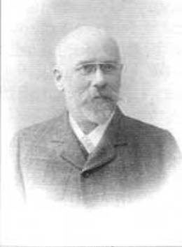 Edmund Zieleniewski (1855-1919) rakouský podnikatel a politik polské národnosti z Haliče